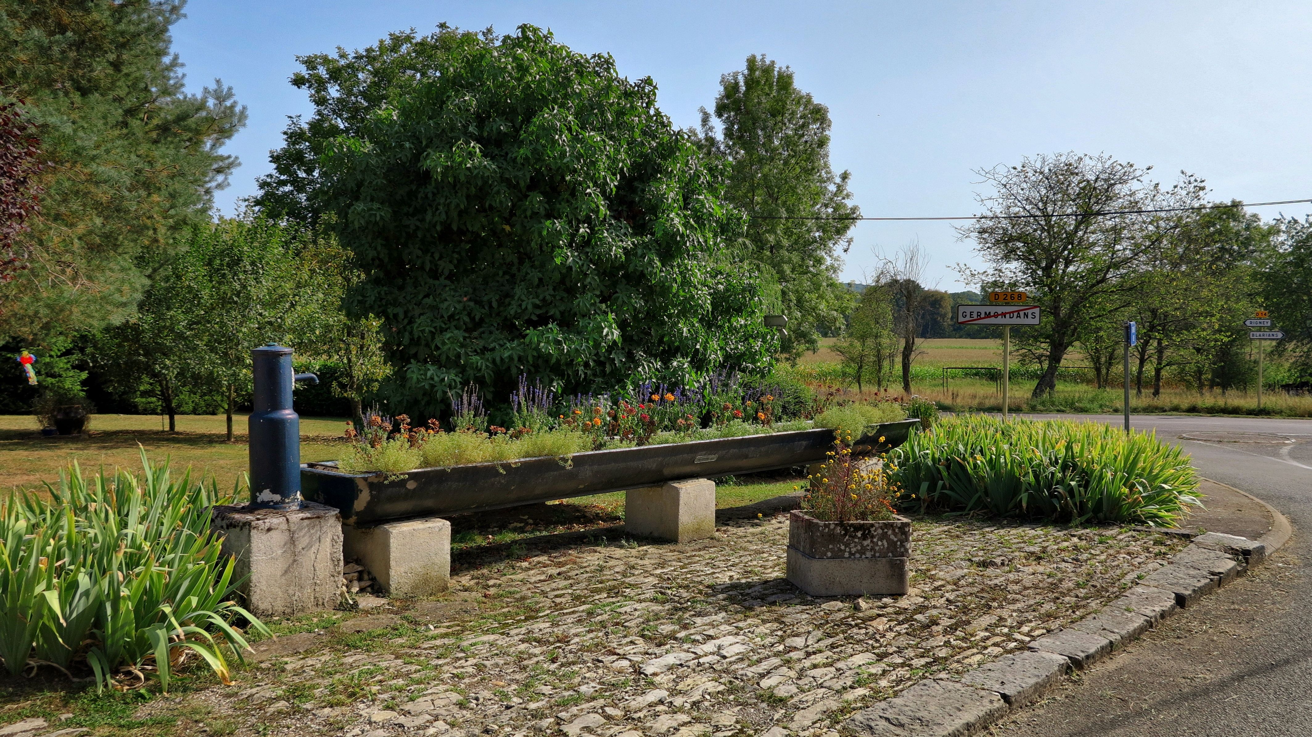 La fontaine-abreuvoir